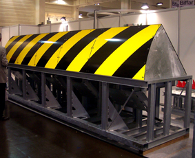 Roadblocker